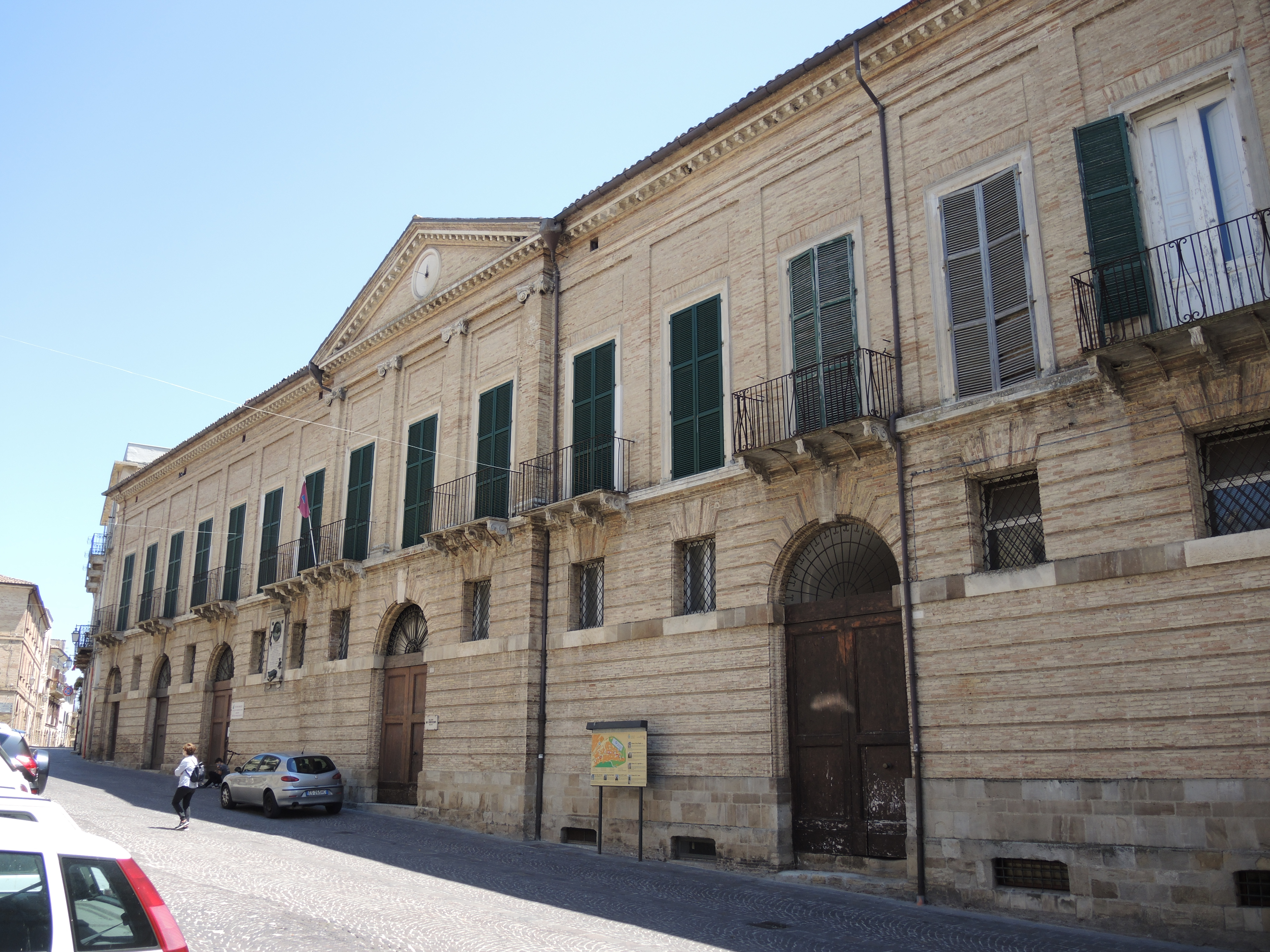 Lanciano - Palazzo De Crecchio